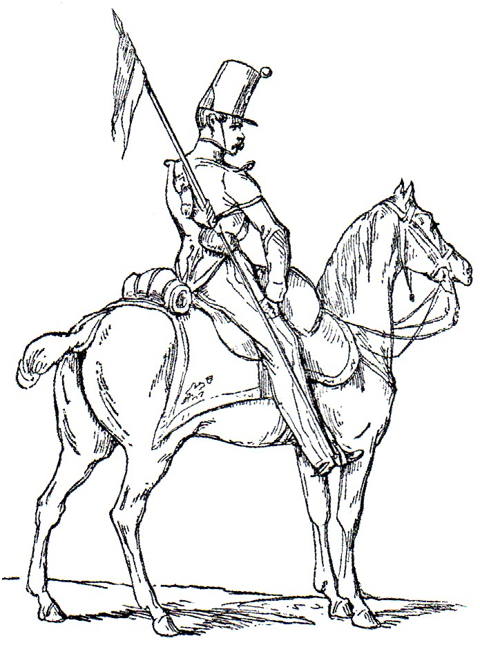 Esploratore a cavallo della Vecchia Guardia